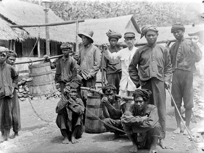 Repronegatief. Dit is een bijzondere foto van een bijzondere plaats. Noesa Kambangan, een eiland tegenover de zuidkust van het westen van Midden-Java, wordt in de bronnen al in 1608 genoemd als een verbanningsoord gebruikt door de vorst van Mataram. De Nederlanders stuurden er politieke gevangen uit Atjeh heen, en ook onder Soekarno en Soeharto bleef het een gevangeniseiland. Sedert 1923 was het ook een natuurmonument, onder meer vanwege het daar voorkomen van een bloem, wijaya kusuma, die gebruikt werd bij de kroningsrituelen van Mataram. De functies van natuurmonument en gevangenis versterkten elkaar uiteraard, omdat in beide gevallen mensen van buiten geweerd worden. Ook nu is het eiland nog een natuurmonument. (P. Boomgaard, 2001). Veroordeelden tewerkgesteld op Noesa Kambangan